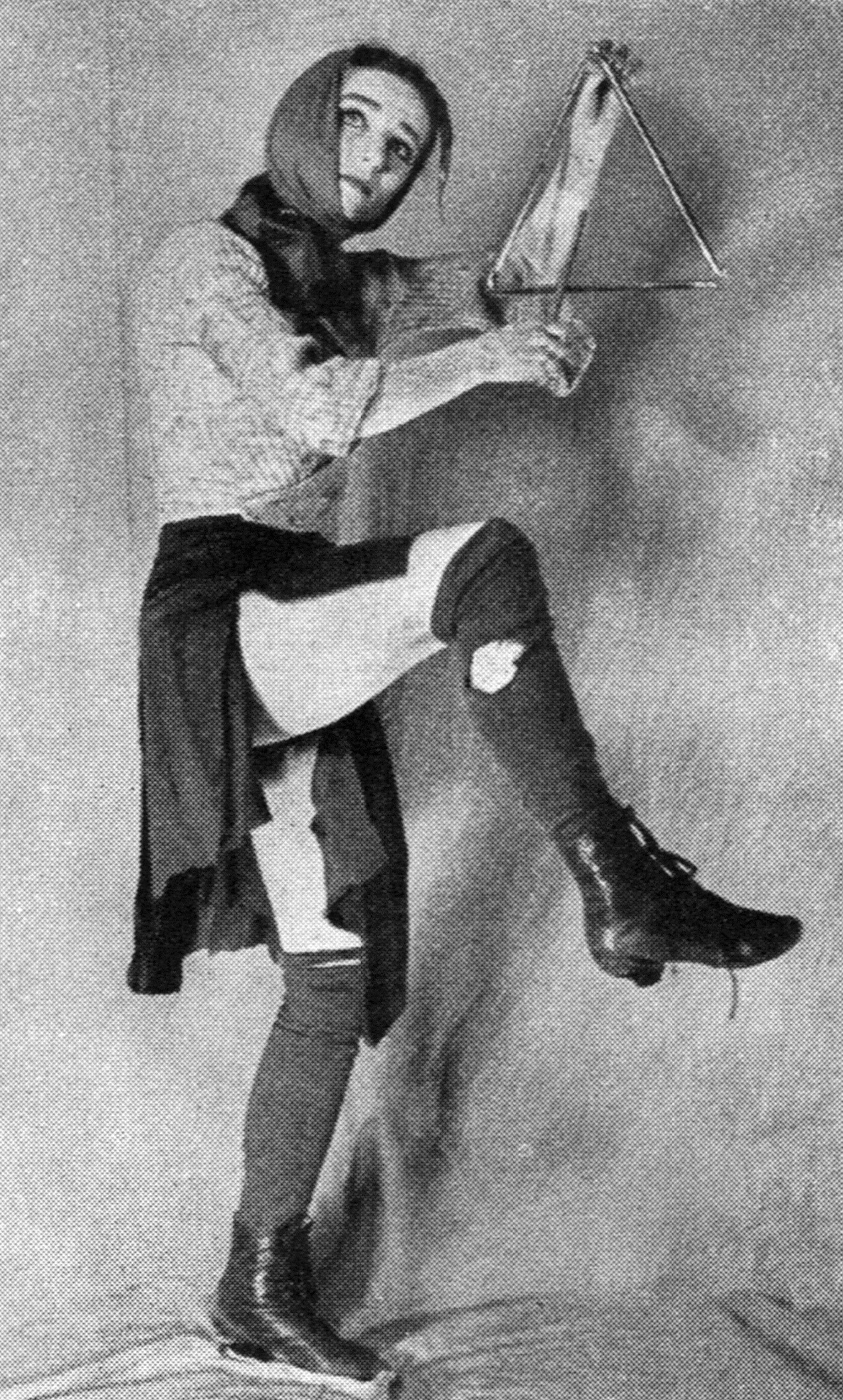 Balettdansören Ellen Rasch som gatudansös i Petrusjka